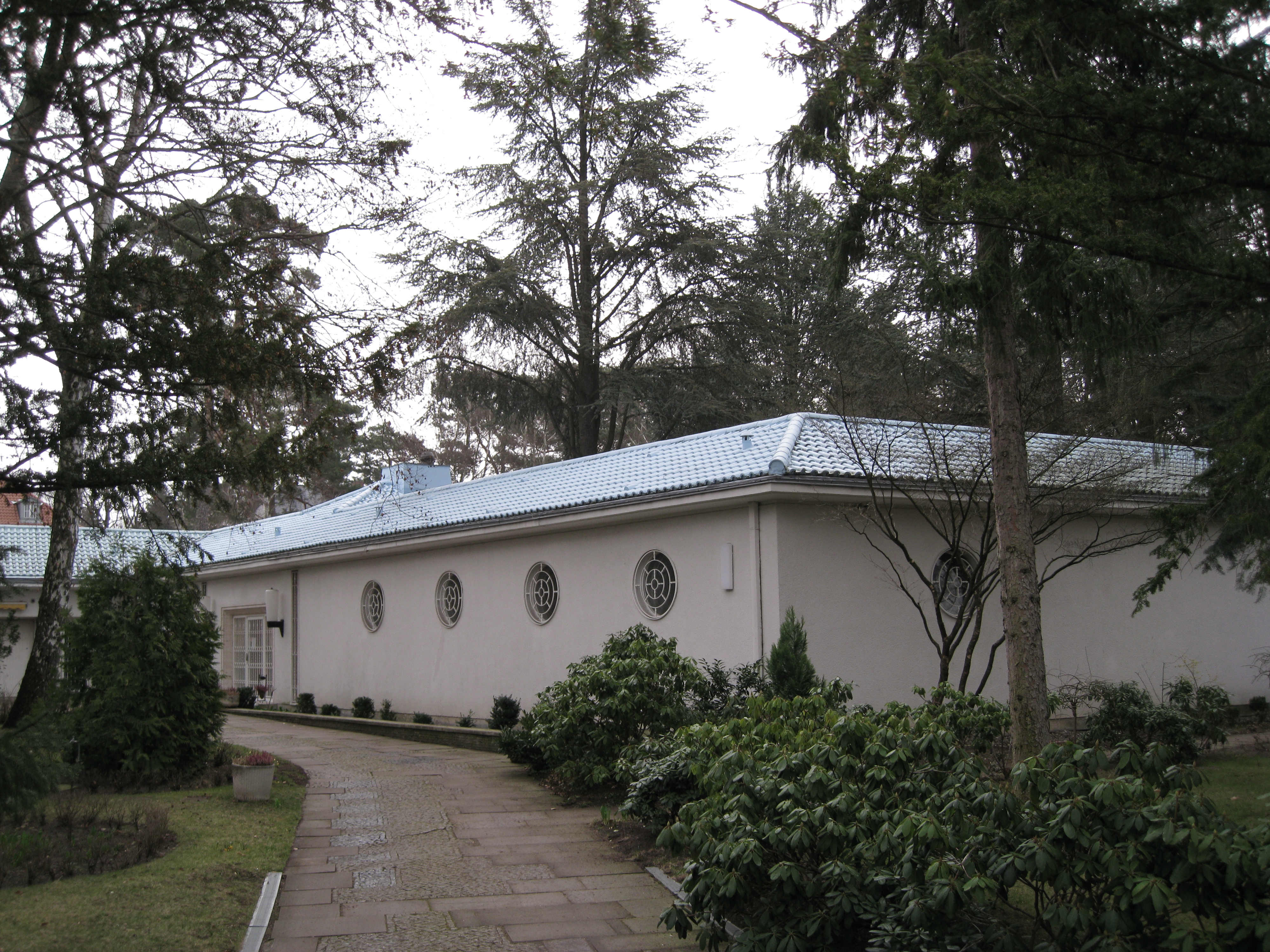 Villa